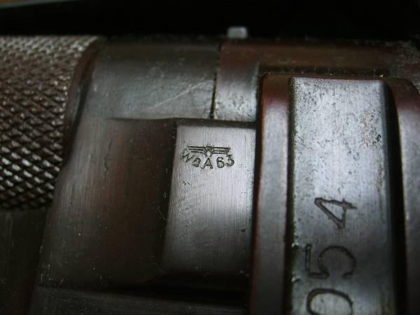 Waffenamt marking